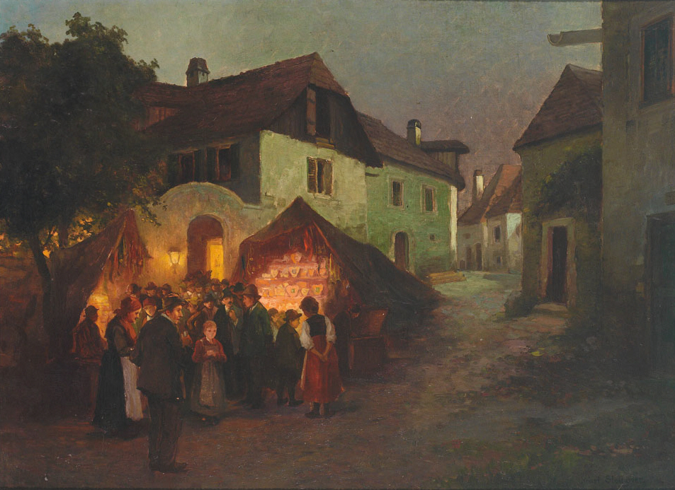 Zahlreiches Volk vor beleuchteten Marktständen an der Kirchweih